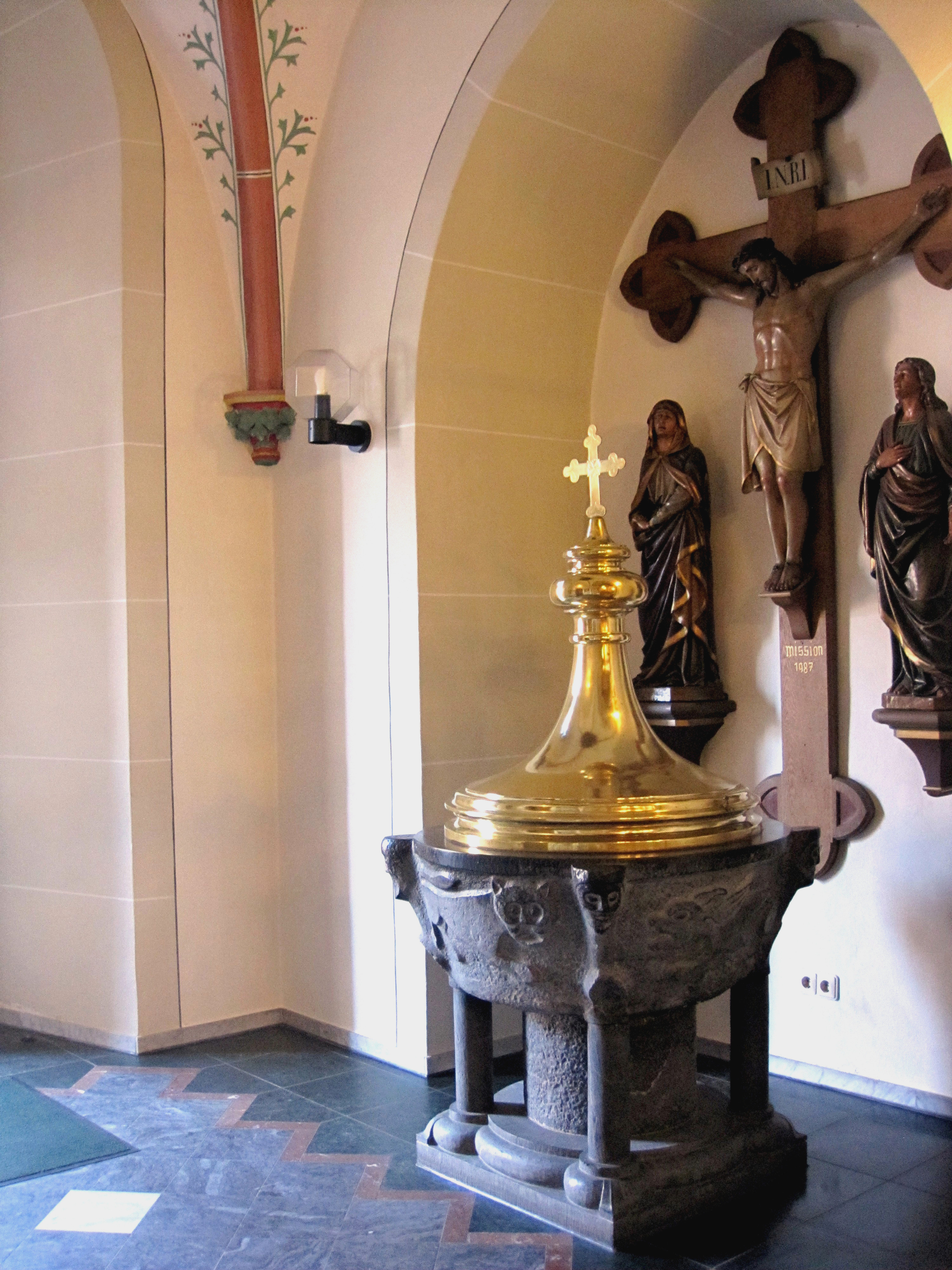 Friesheim-St- Martin-Taufbecken-12-Jh-mit-Messinghaube